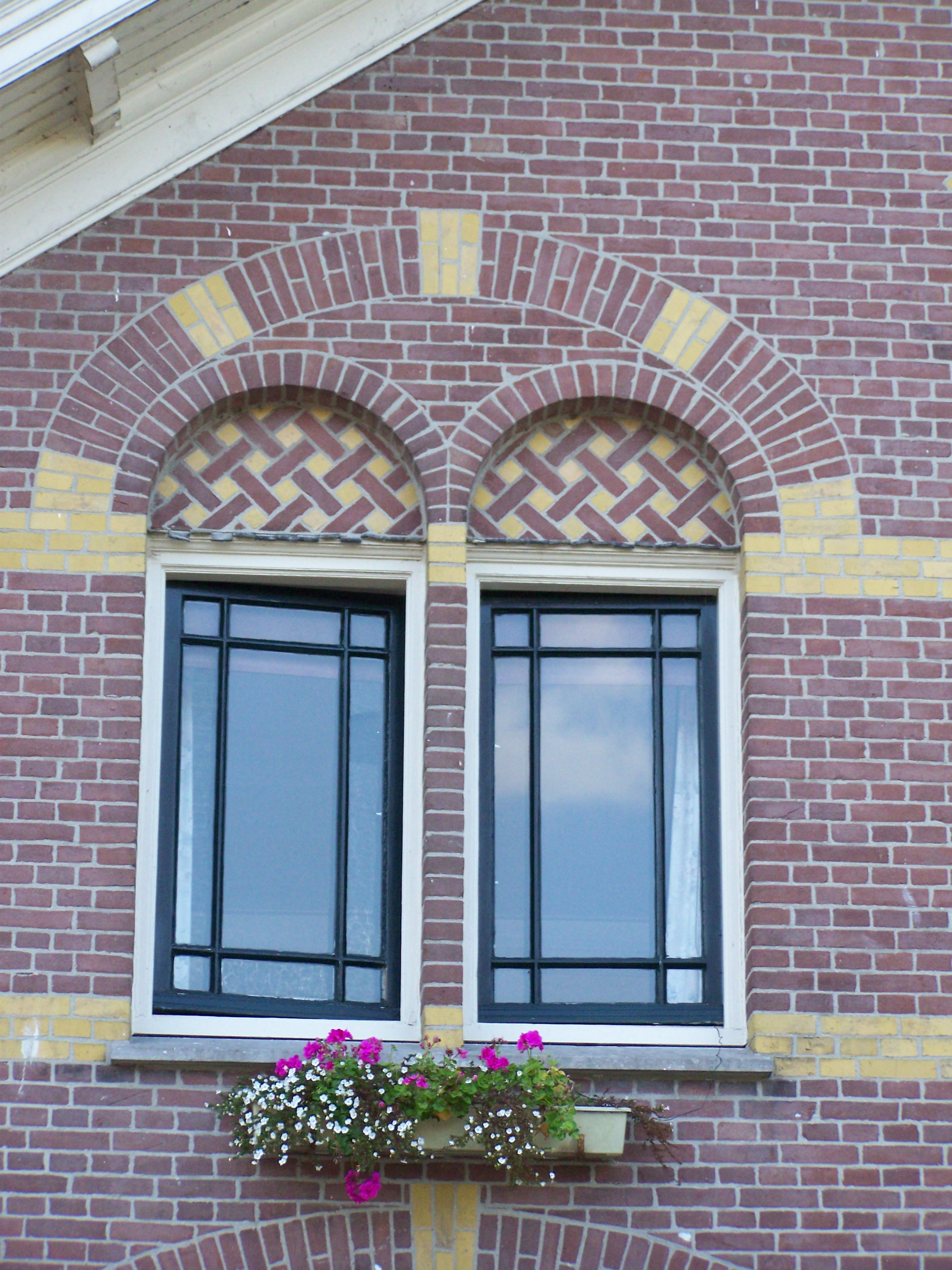 Snouck van Loosenpark raampartij van huizenblok